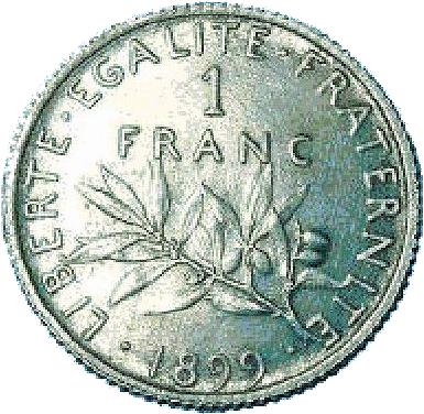 Revers de la 1 franc semeuse émise en 1899